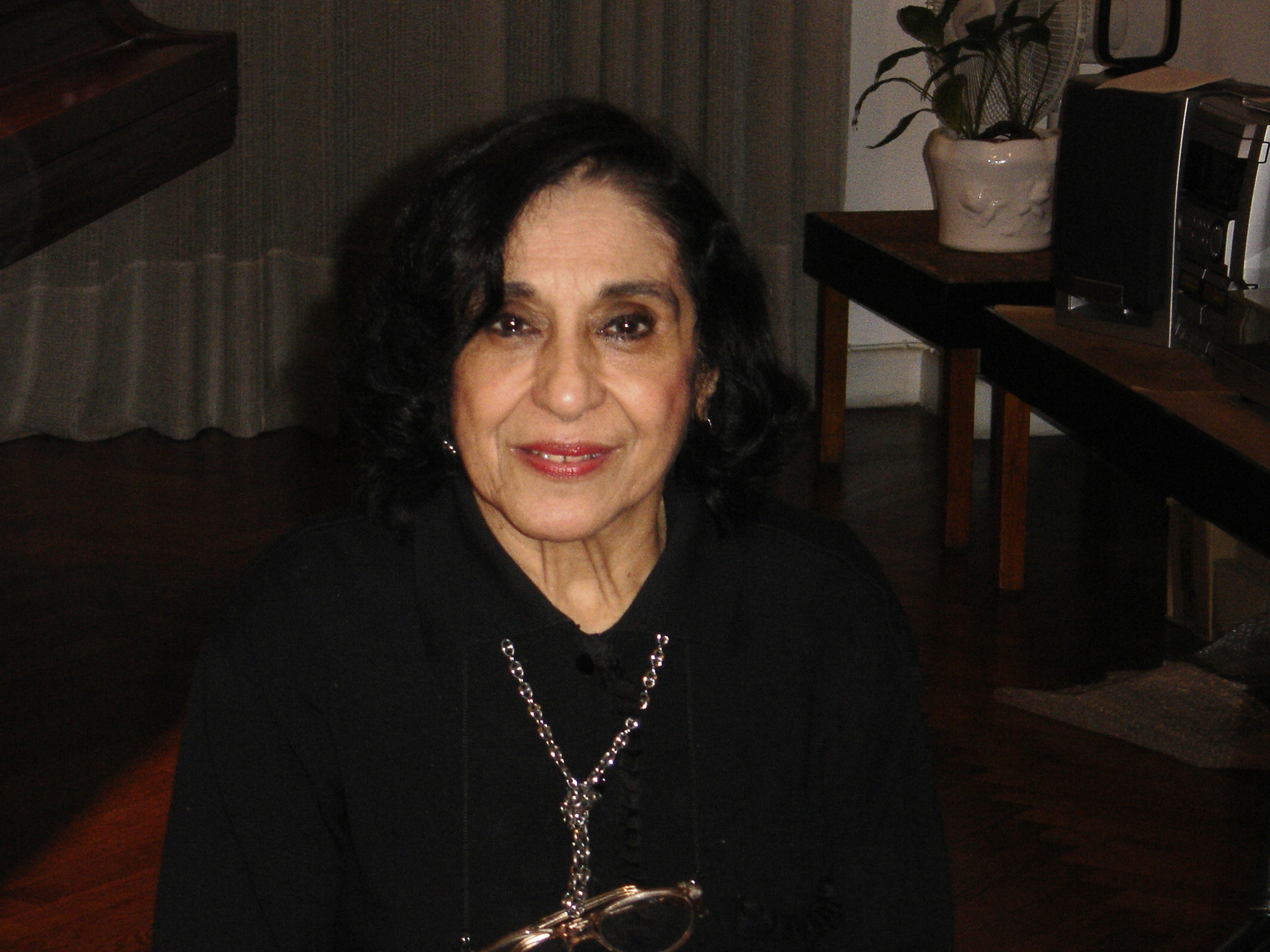 María Rosa Oubiña, Cucucha